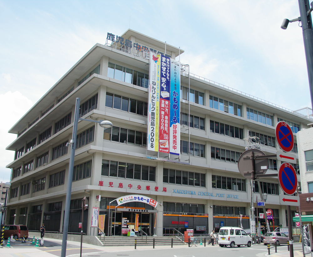 鹿児島市にある鹿児島中央郵便局